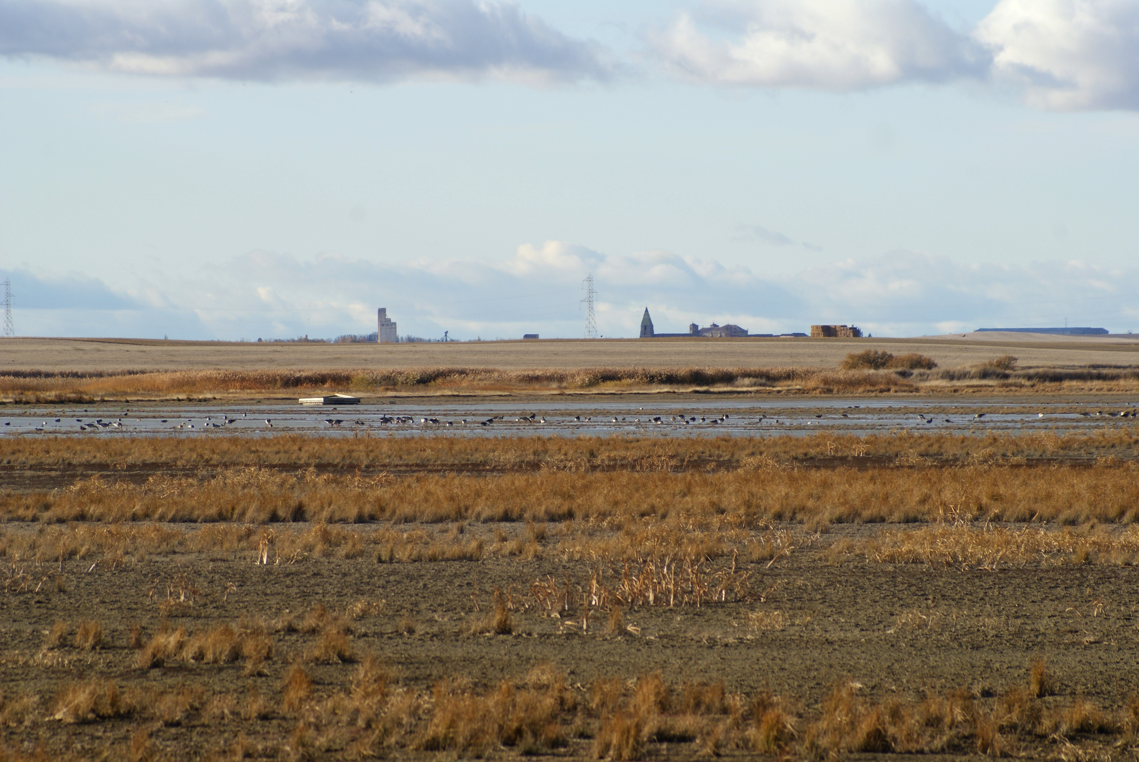 Laguna (o Nava) de Pedraza de Campos, provincia de Palencia (España). Foto tomada durante el otoño, cuando la laguna empieza a inundarse naturalmente. Se aprecian varias decenas de ánsares (Anser anser). La torre del fondo pertenece a la iglesia de Castromocho.